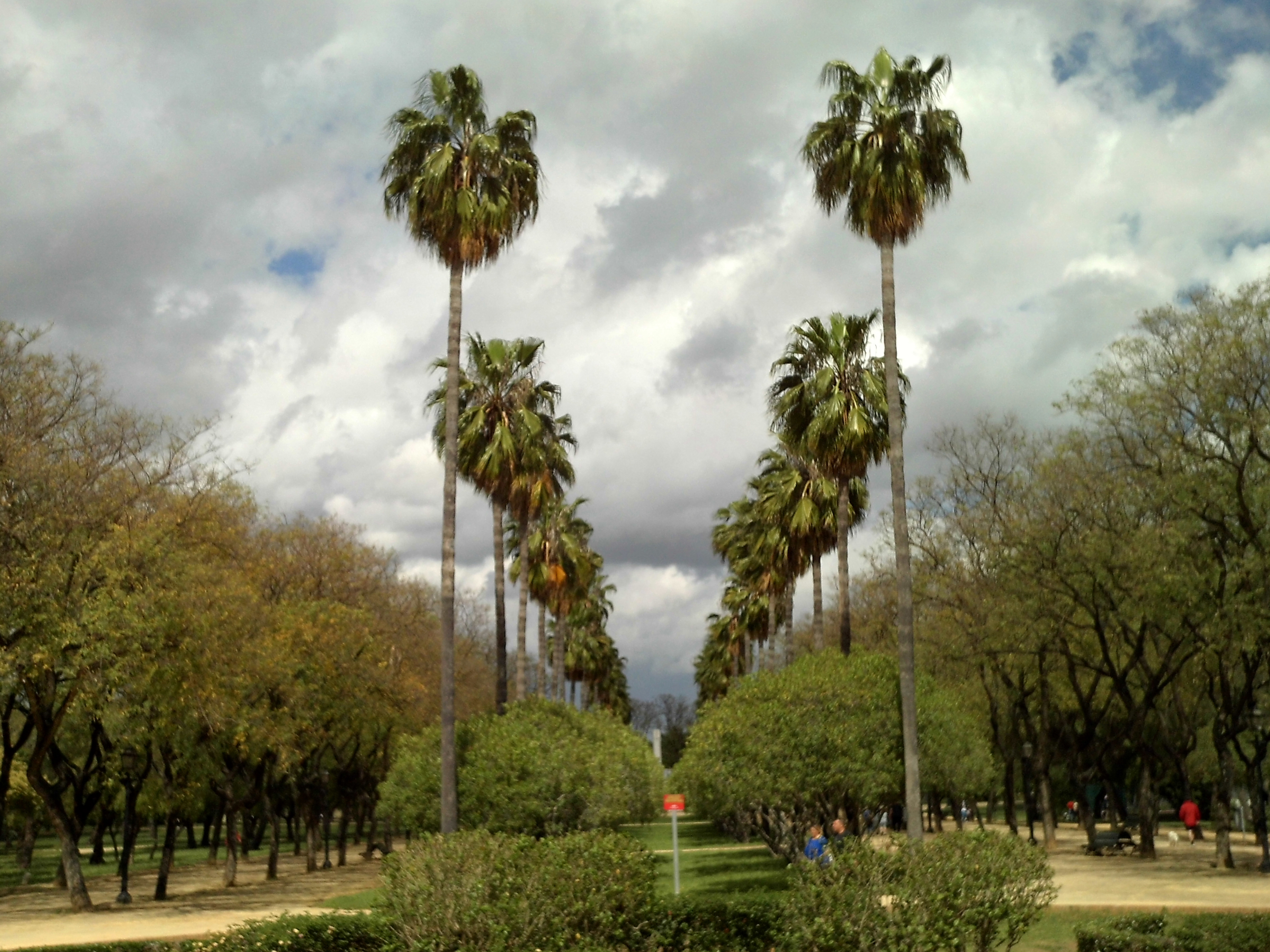 Camino de las Palmeras Washingtonias. Parque Amate. Sevilla, Andalucía, España.